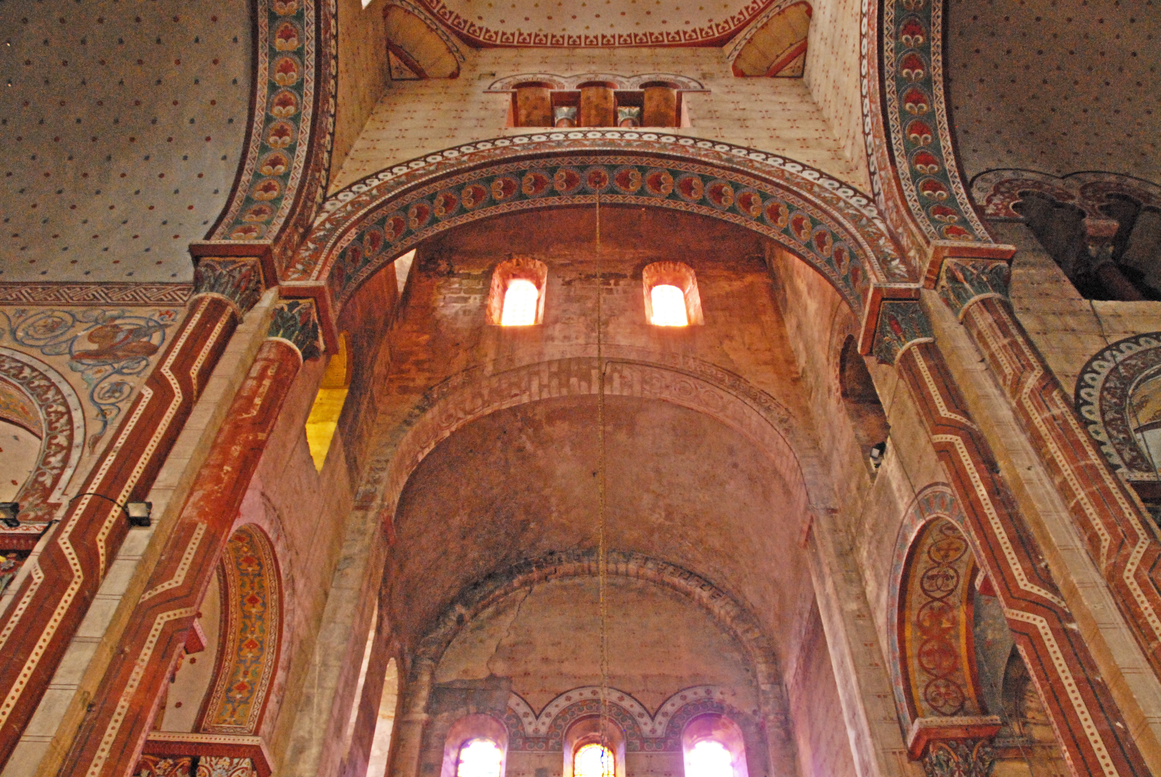 massif barlong + südl. Querhausarm